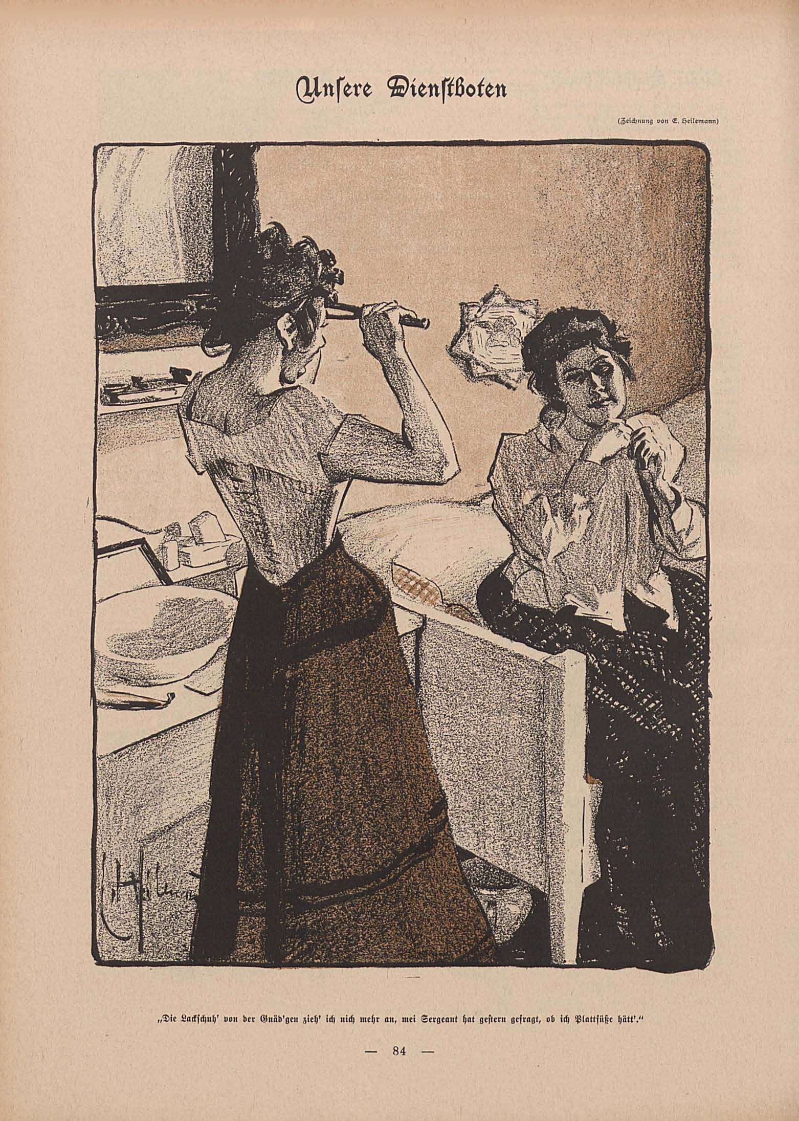 Unsere Dienstboten; aus: Simplicissimus, Jg. VI, Bd. 1, Heft 11, 4. Juni 1901, S. 84 „Die Lackschuh' von der Gnäd'gen zieh' ich nich mehr an, mei Sergant hat gestern gefragt, ob ich Plattfüße hätt'.“